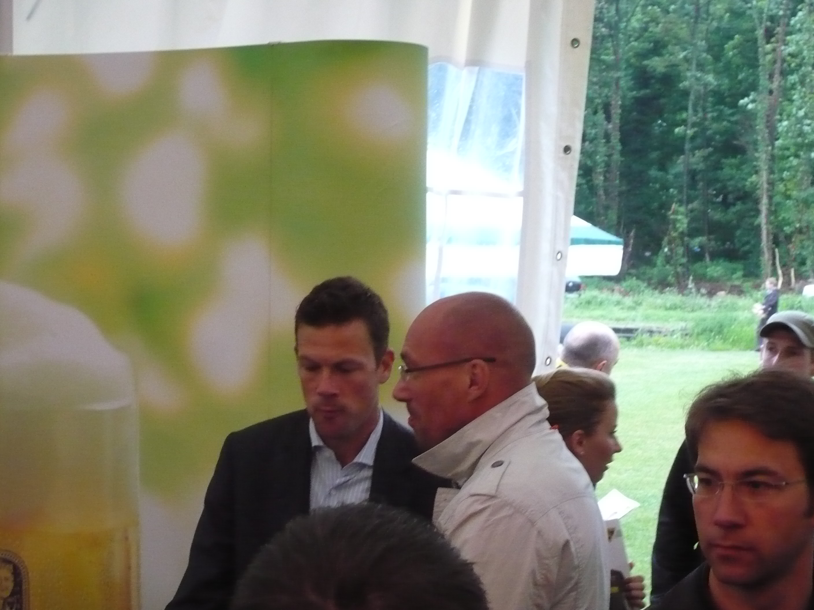 Jürgen Seeberger (re.) im Gespräch mit Erik Meijer zwischen Fans beim "ersten Spatenstich" zum neuen Tivoli in Aachen am 17. Mai 2008